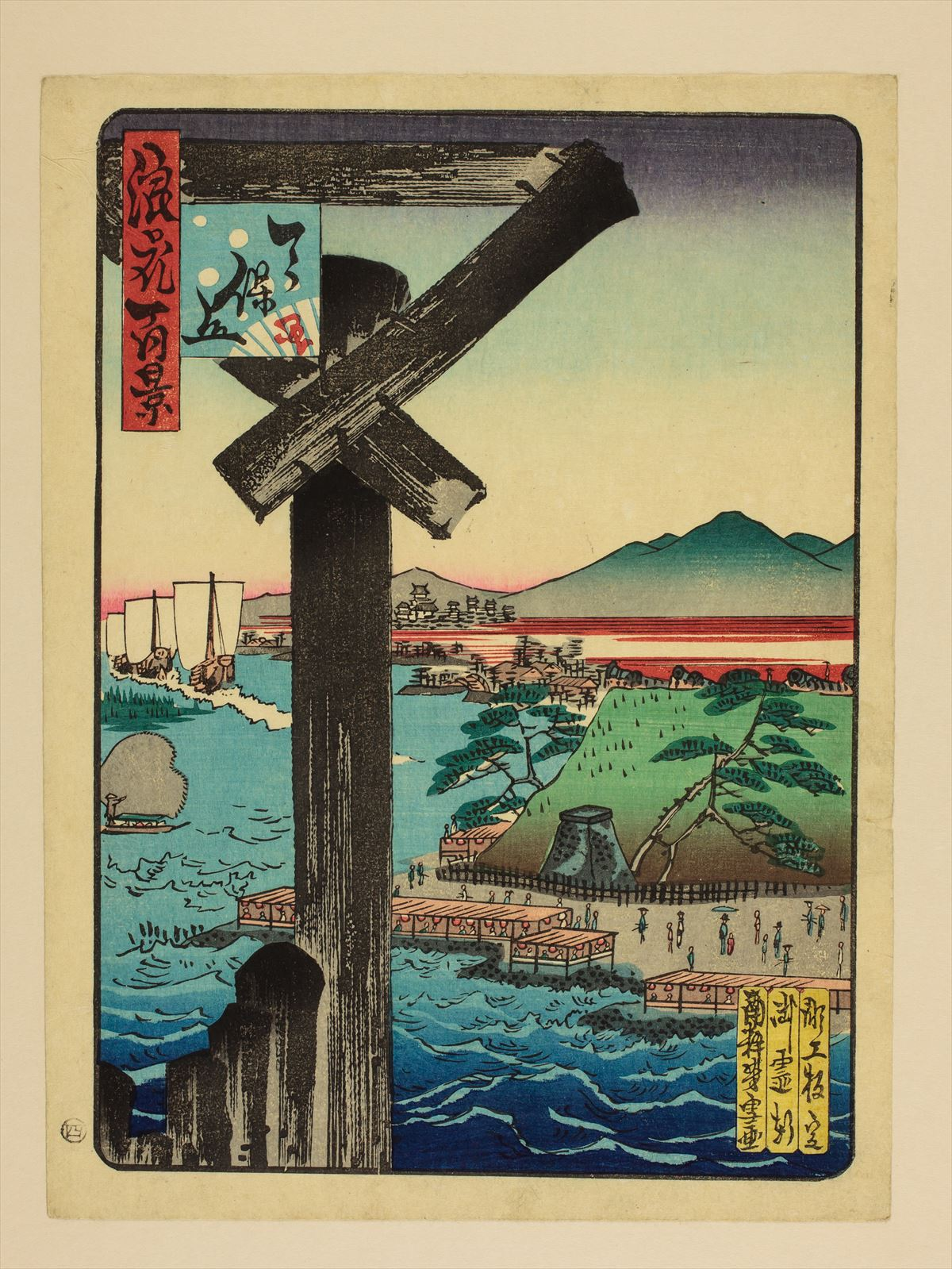 1800年代。南粋亭芳雪/画。浪花百景 102枚のうちの1枚。大阪市立中央図書館蔵。